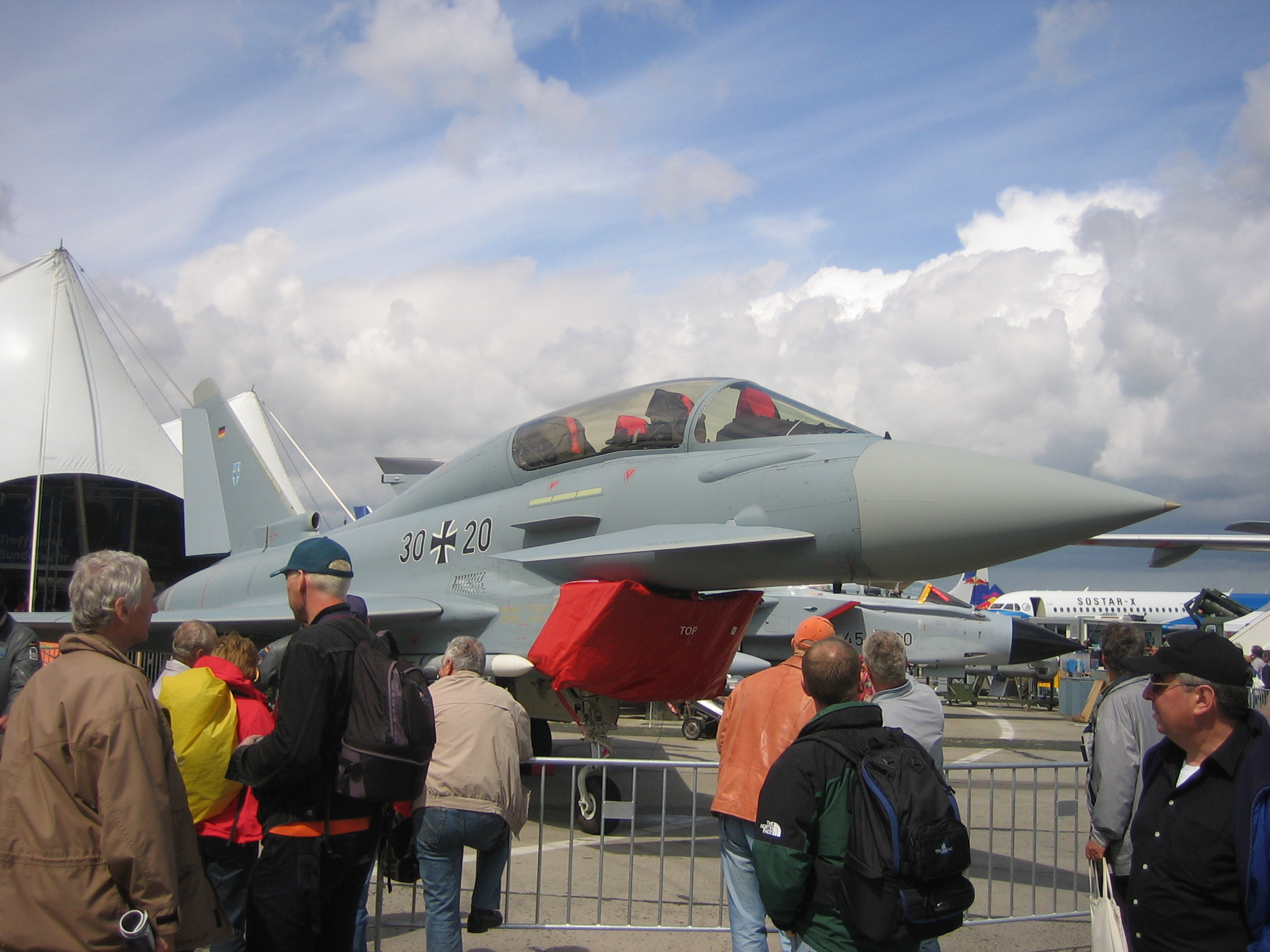 Bildbeschreibung: Eurofighter Typhoon.